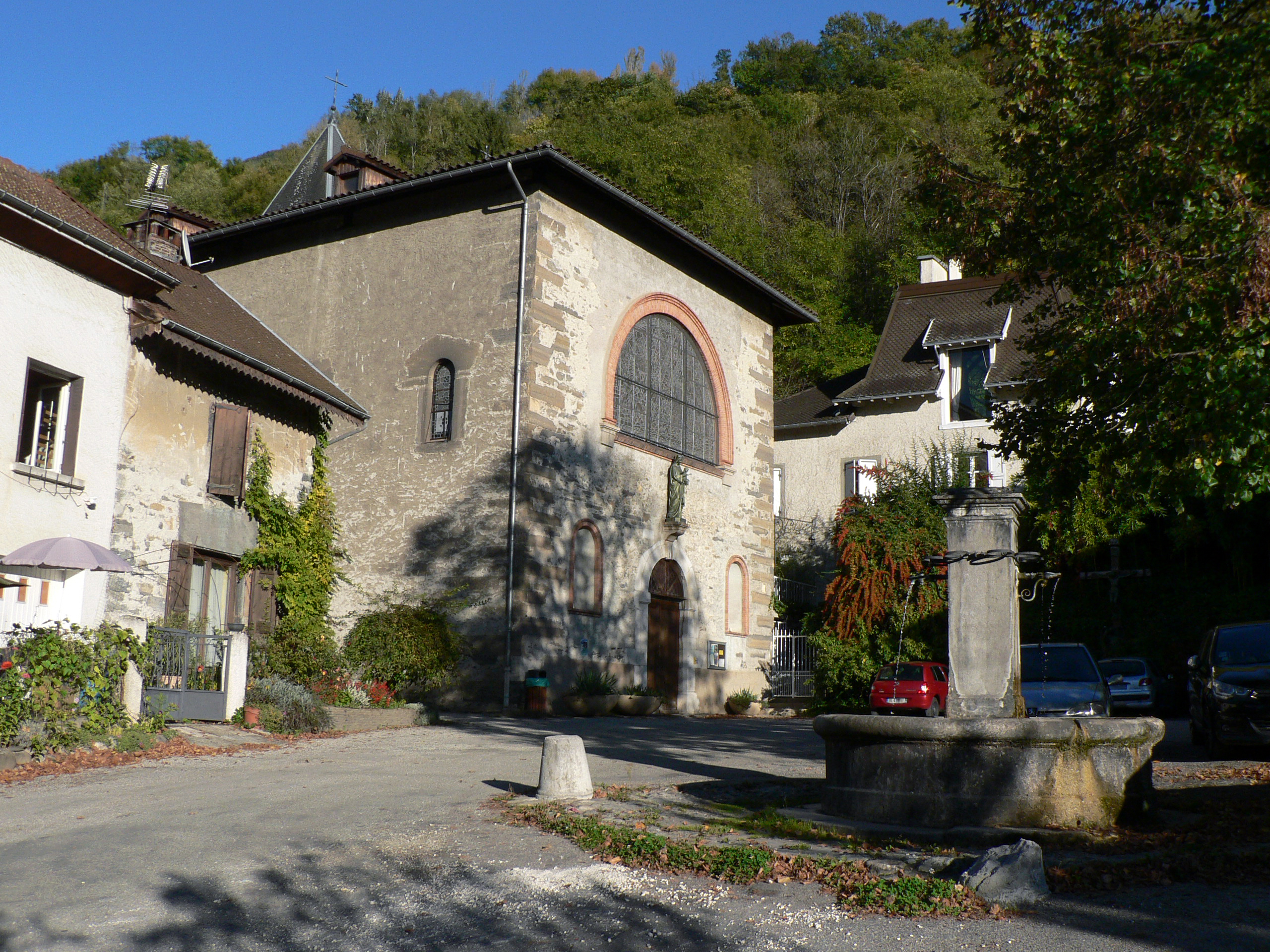 place de l'église. Tencin, Isère, France